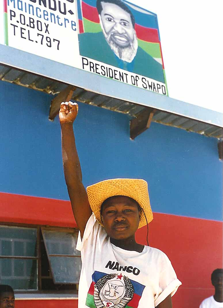 Namibien:Wahlkampagne 89-90 Südwestafrikanische Volksorganisation (SWAPO)